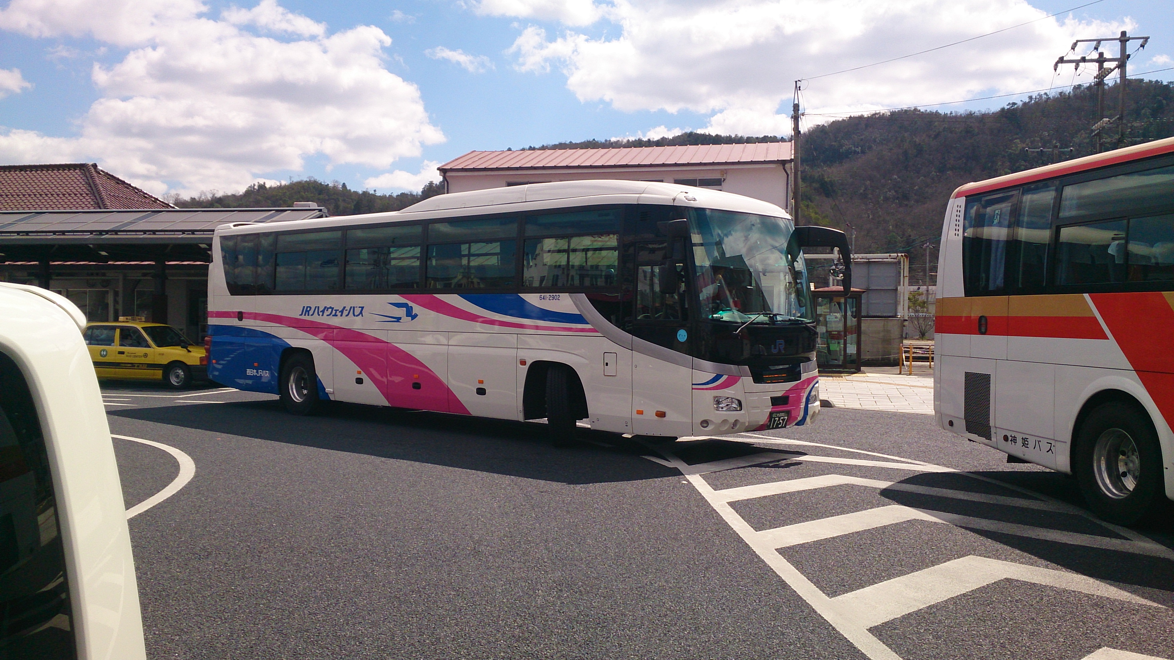 西日本JRバスのセレガーラ 津山駅前にて撮影 右側は 神姫バスの車両エアロエース